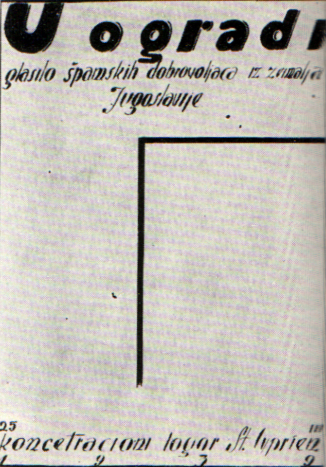 Srpskohrvatski / српскохрватски: "U ogradi", bilten koji su izdavali jugoslovenski španski dobrovoljci u francuskom konc. logoru "St. Cyprien". Uređivao ga je i tehnički pripremao Otmar Kreačić-Kultura.